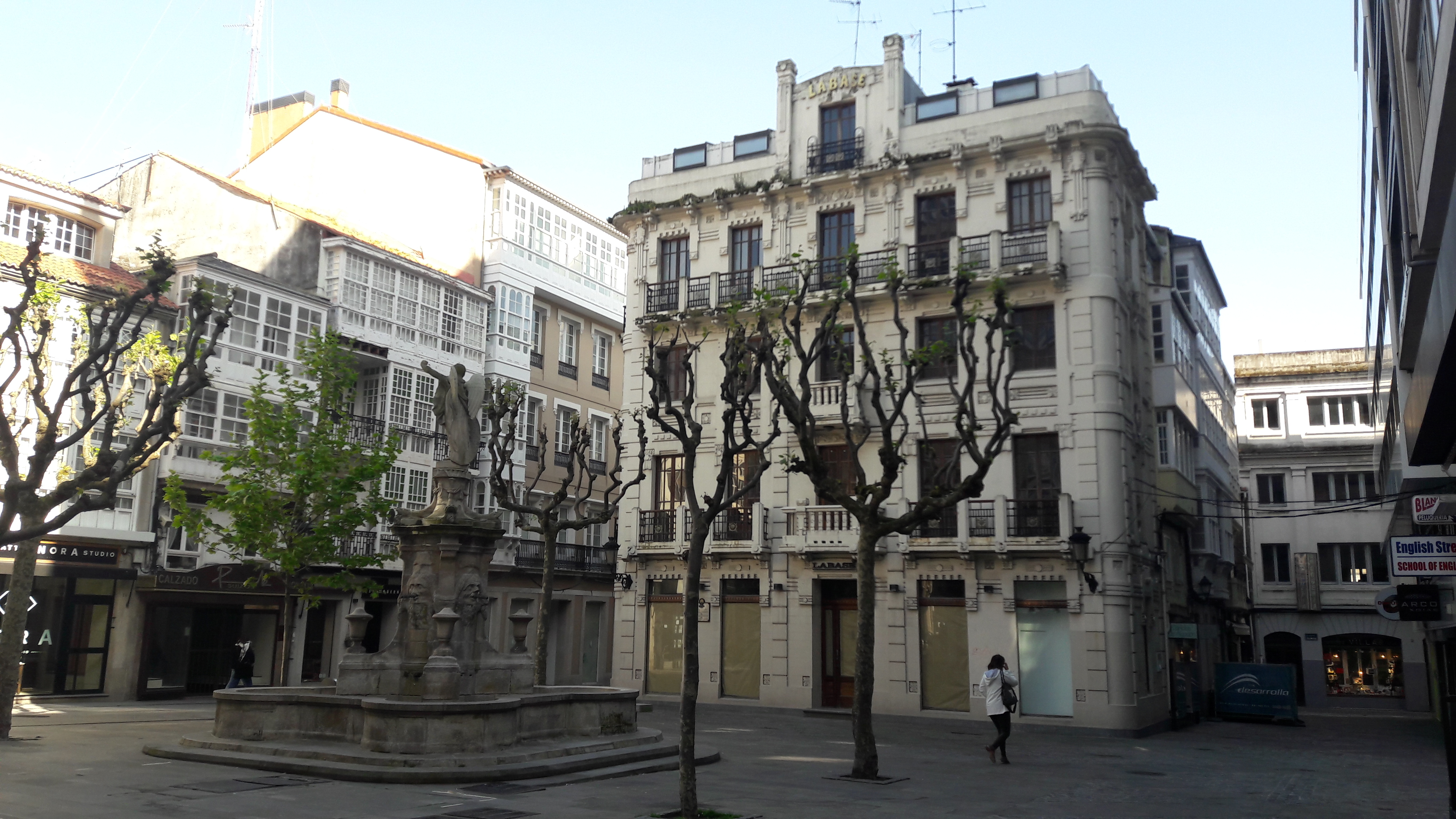 Praza de Santo André na Coruña, coa Casa Cabanela, de Julio Galán Carvajal (1910-11) e a fonte da Fama